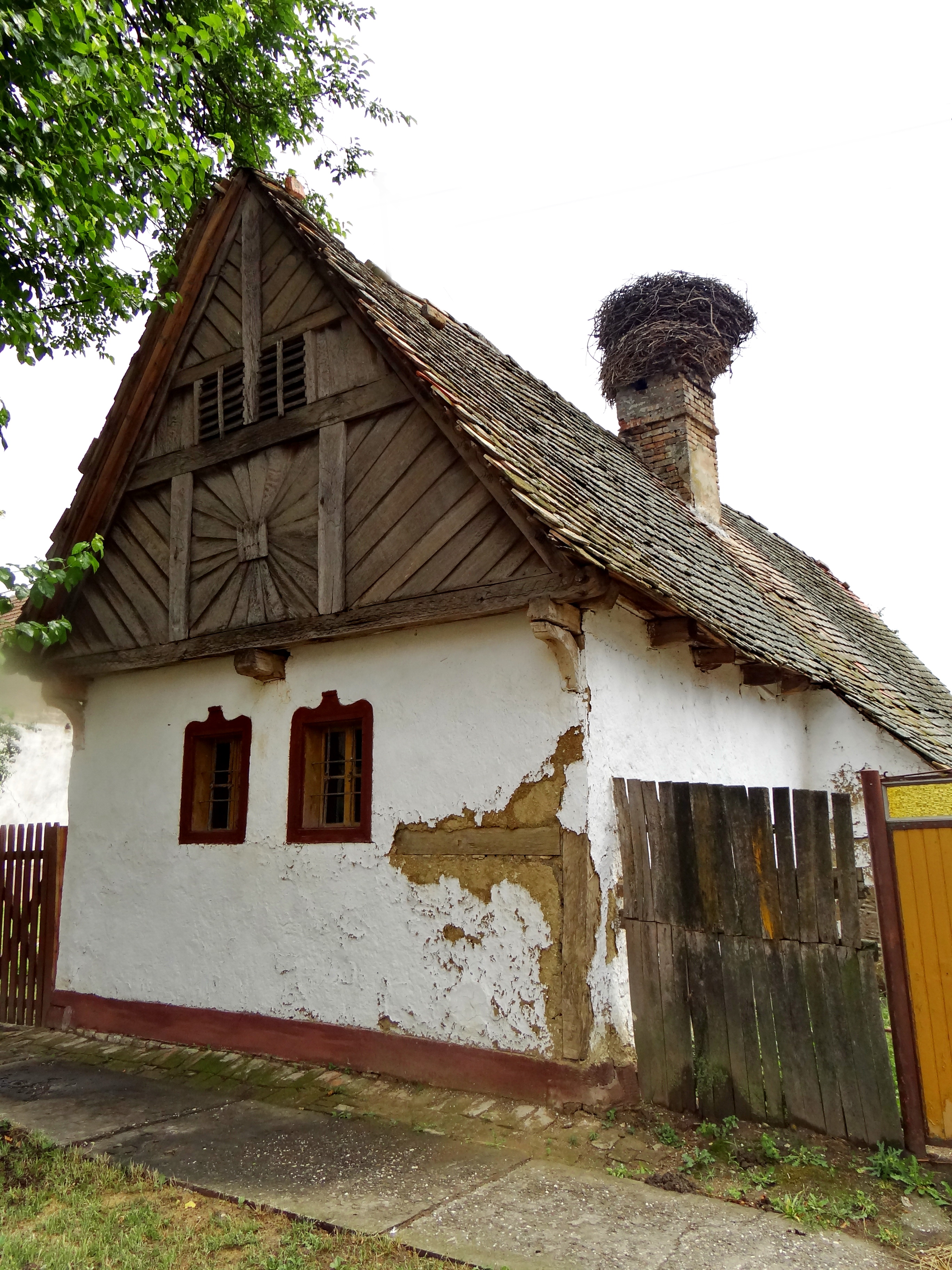 Seoska kuća u Ogaru